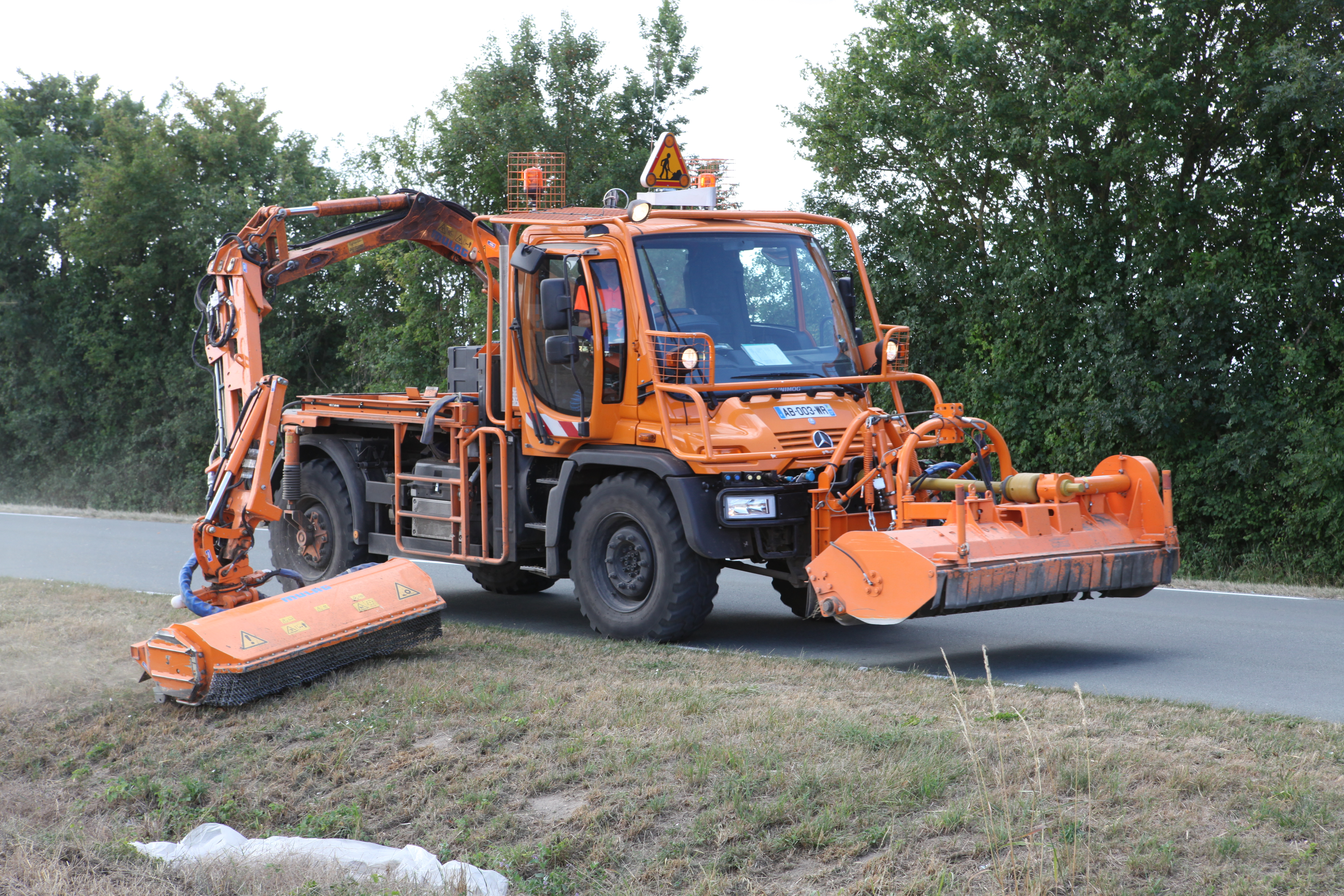 Unimog U 400.